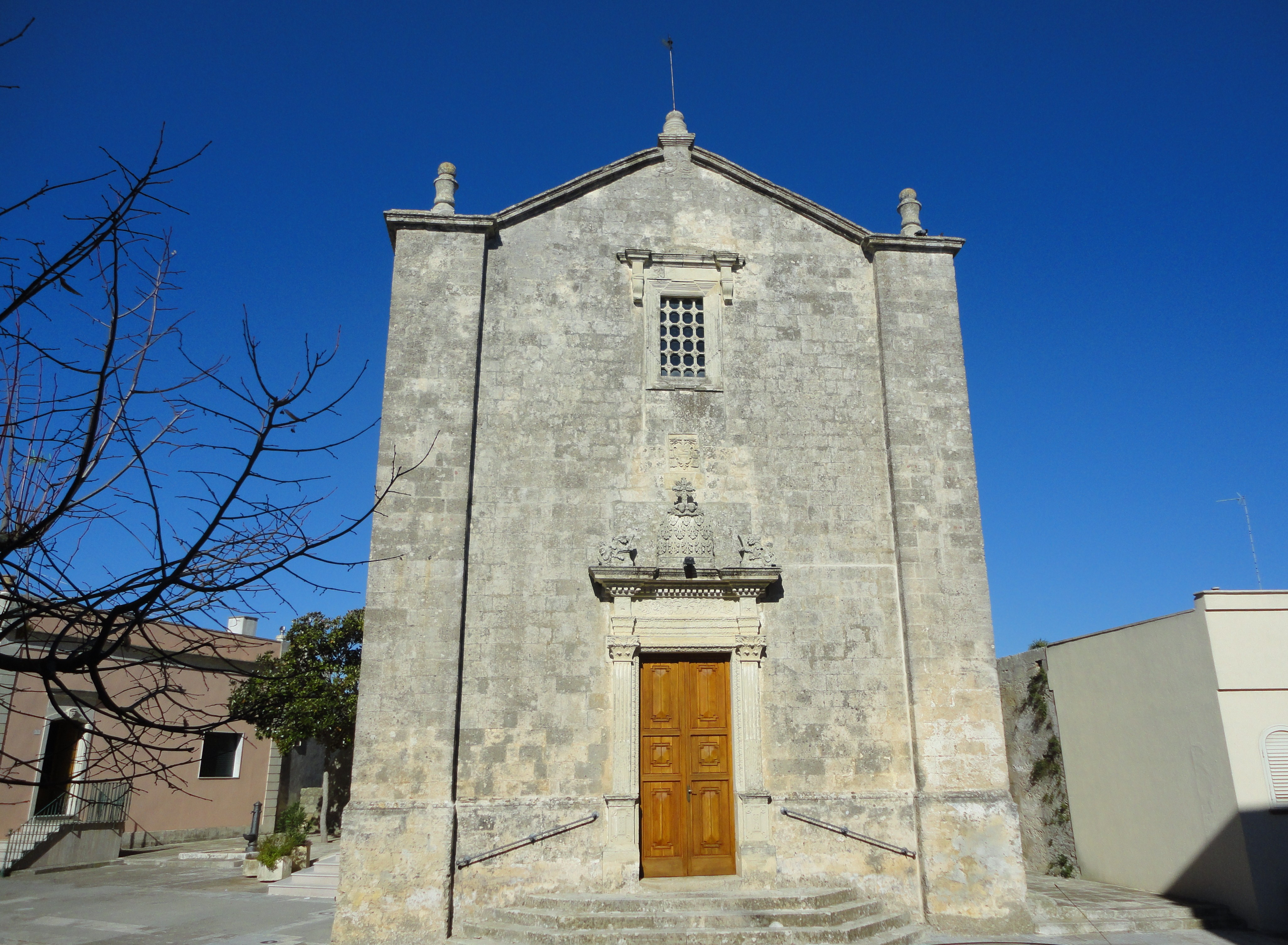 Chiesa dell'Immacolata a Diso, Lecce